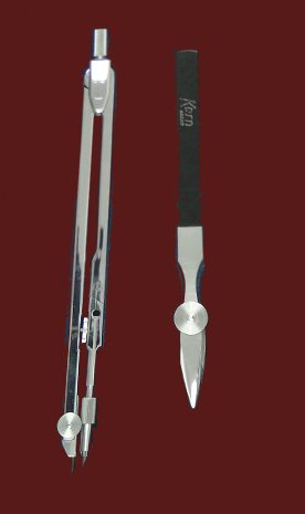 Compás y tiralíneas Kern